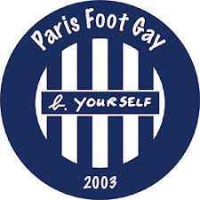 Logo du Paris Foot Gay